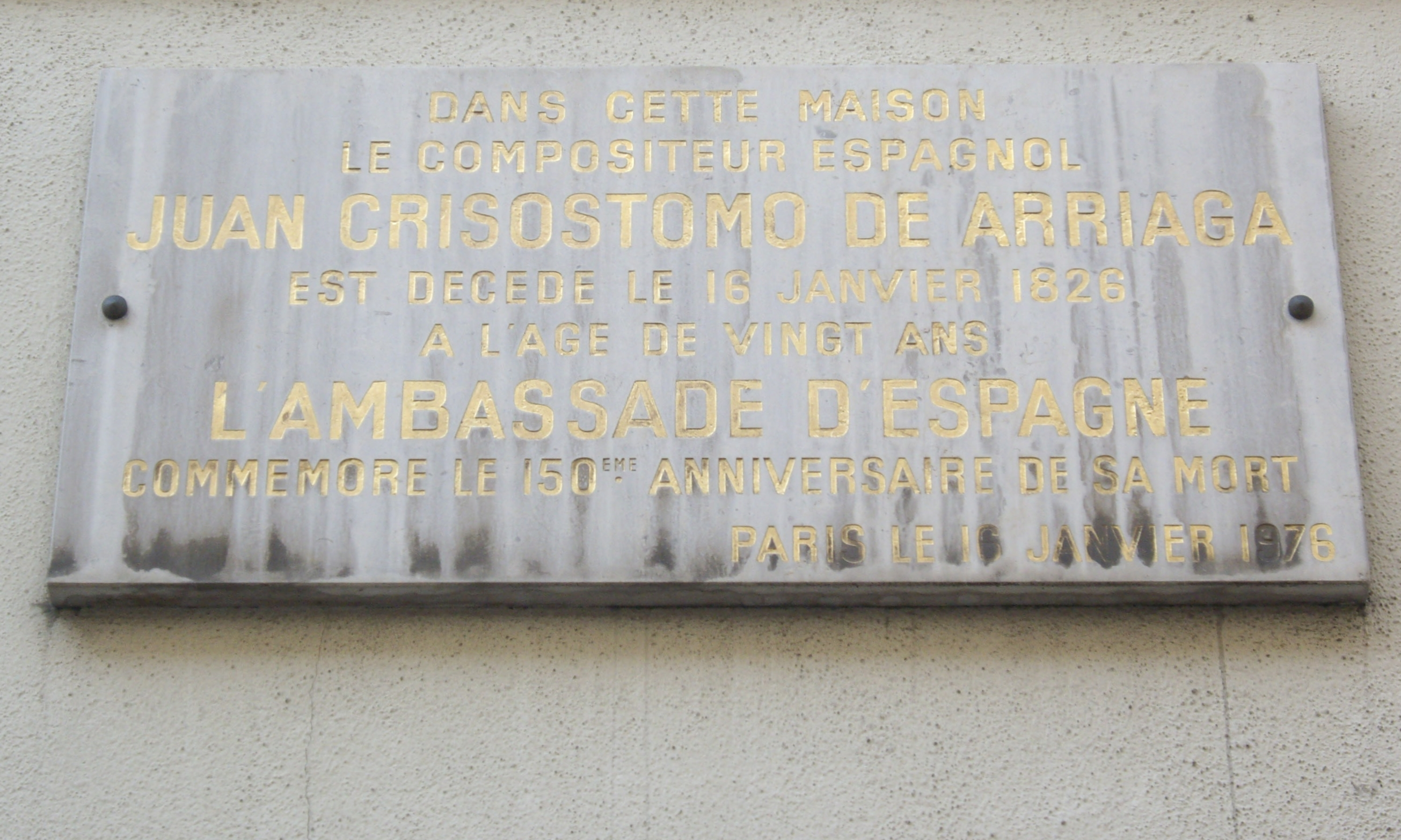 Plaque apposée au n° 314 de la rue de Saint-Honoré, Paris 1er, où mourut le compositeur Juan Crisóstomo Arriaga le 16 janvier 1826 à l'âge de vingt ans.